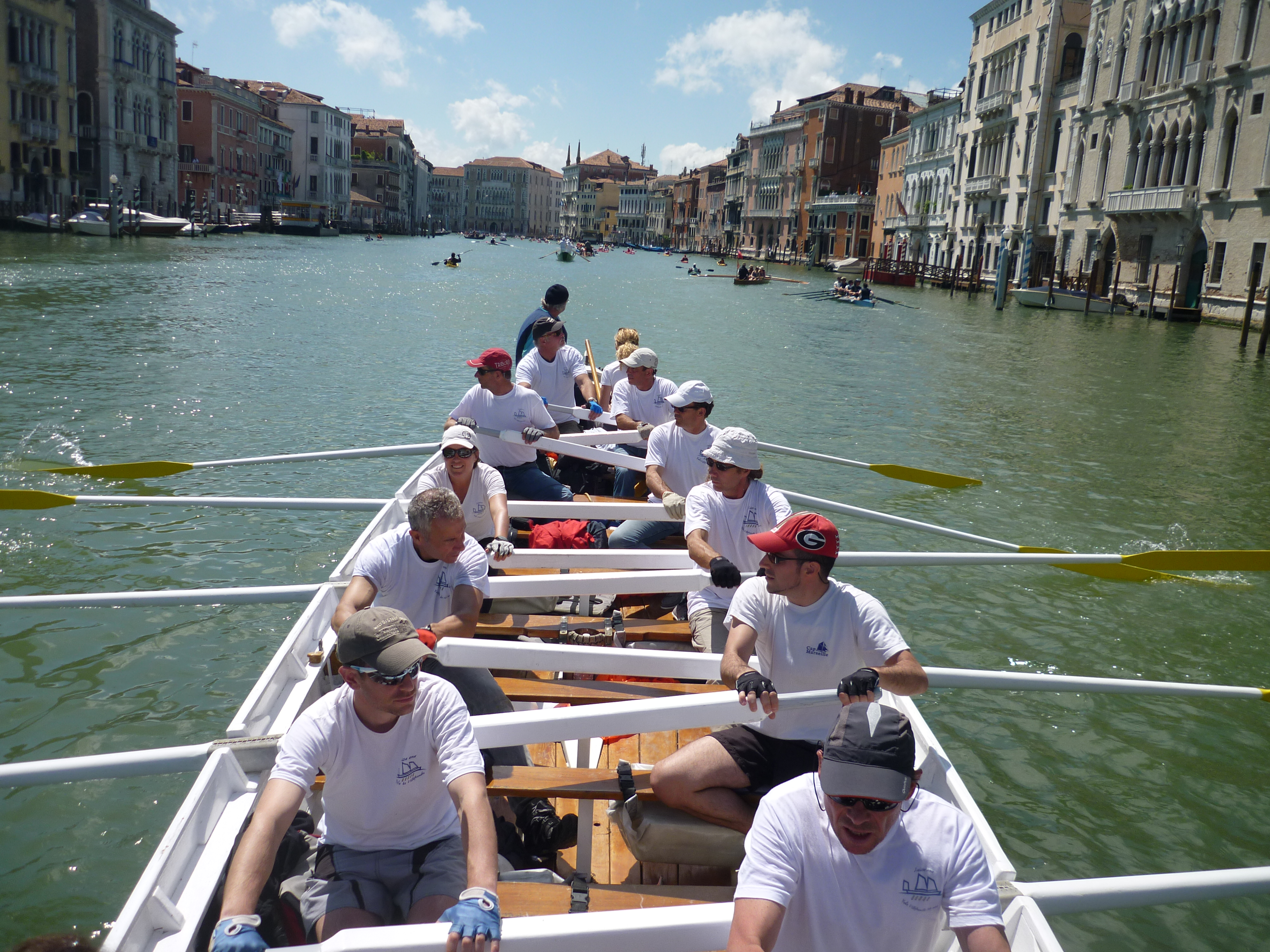 La Yole de Villefranche-sur-Mer (près de Nice) à La Vogalonga 2013 de Venise (